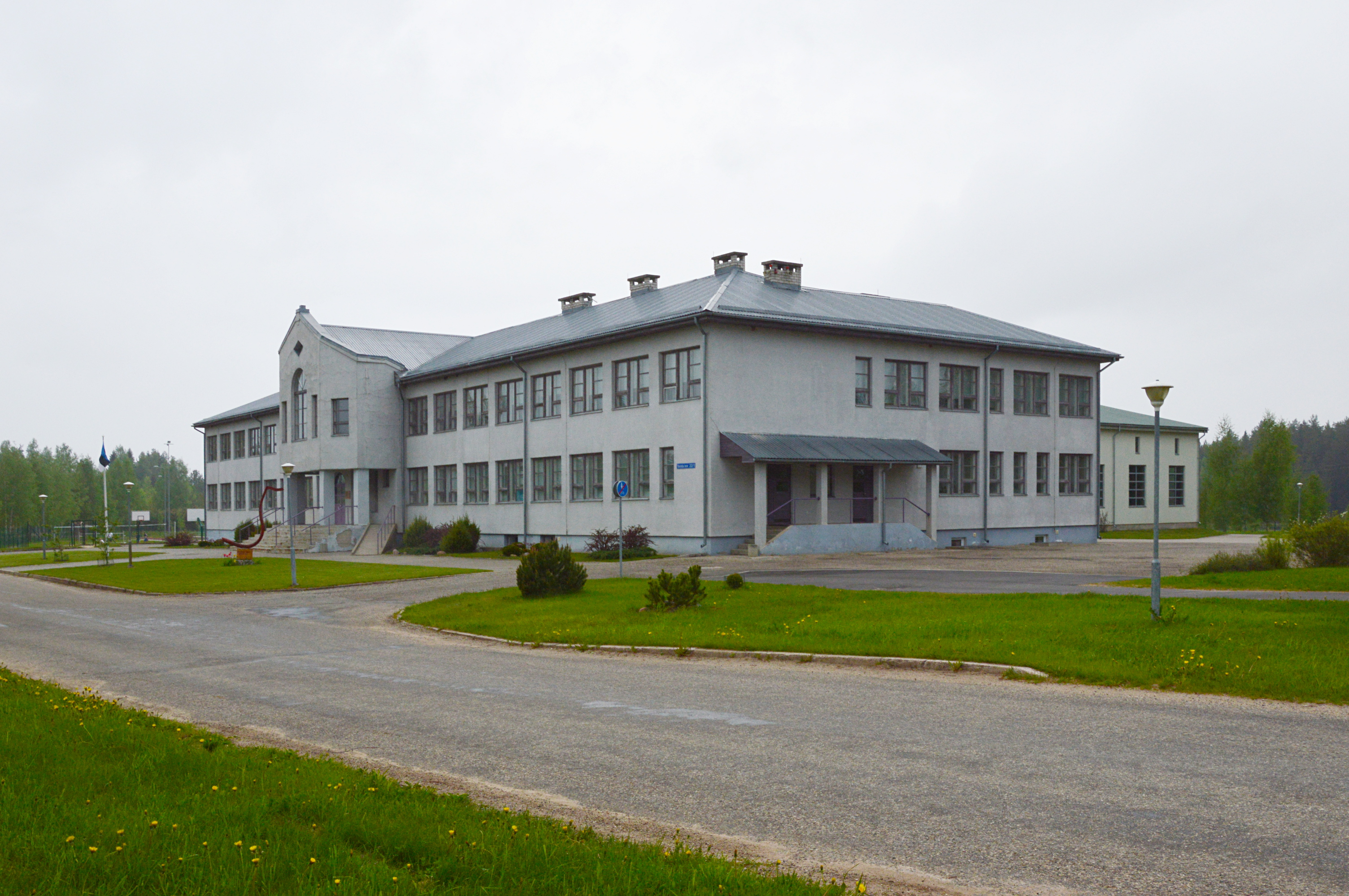 Orava koolimaja